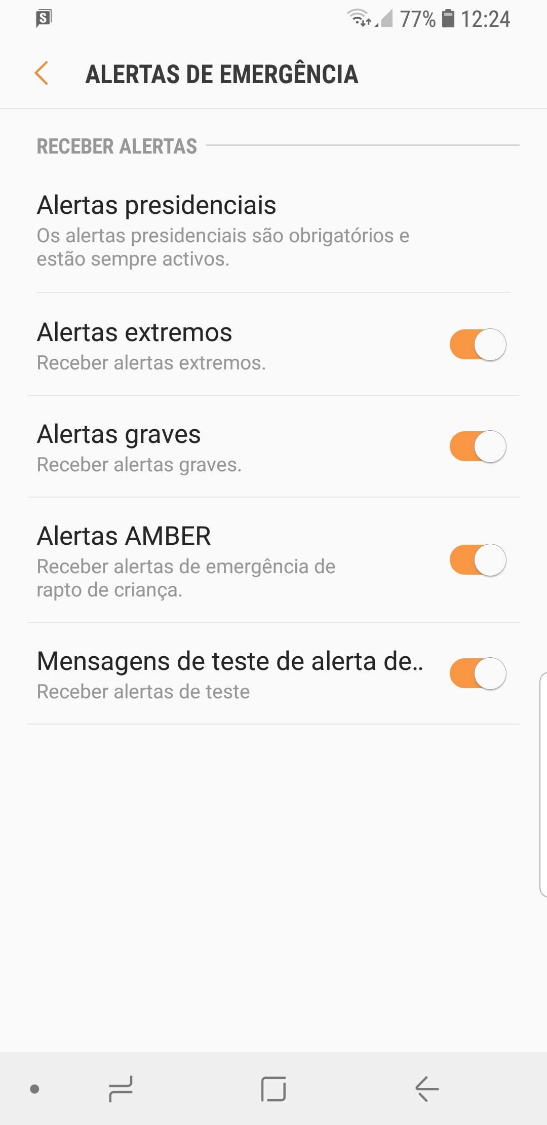 Cell broadast portugal